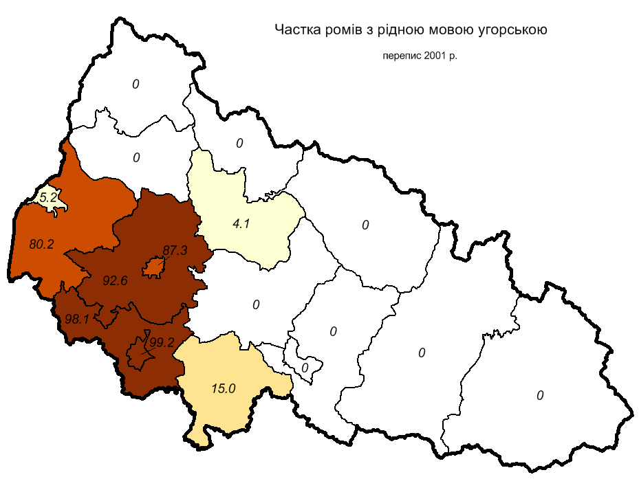 Частка циган (ромів) Закарпатської області що назвали рідною мовою угорську під час перепису 2001 року / Percentage of roma people with hungarian as native language in Zakarpatska oblast (Transcarpathia) 2001 census